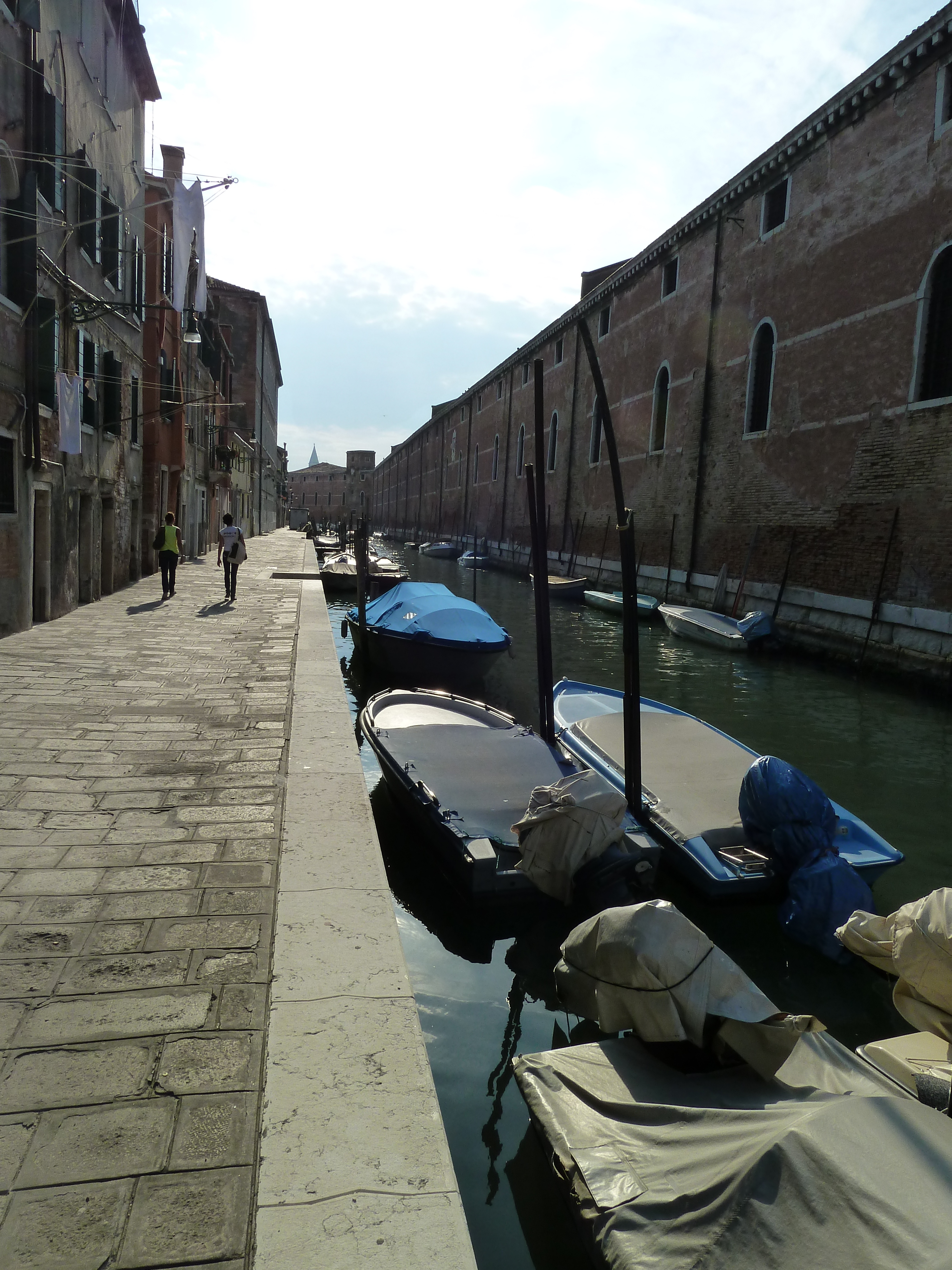 Rio della Tana (Venice)